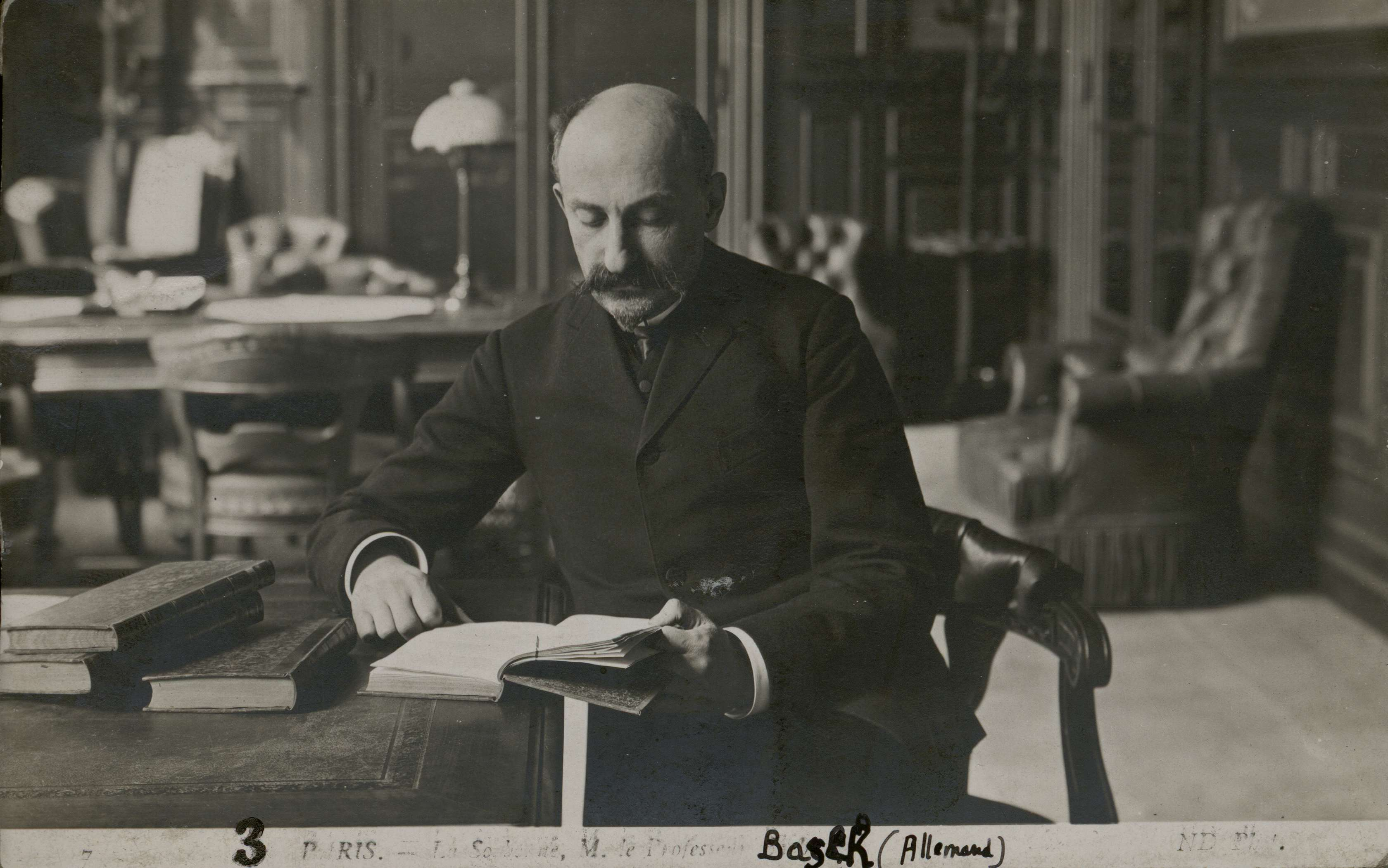 Carte postale